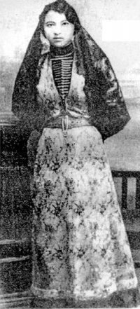 Княжна Атажукина, Кабарда